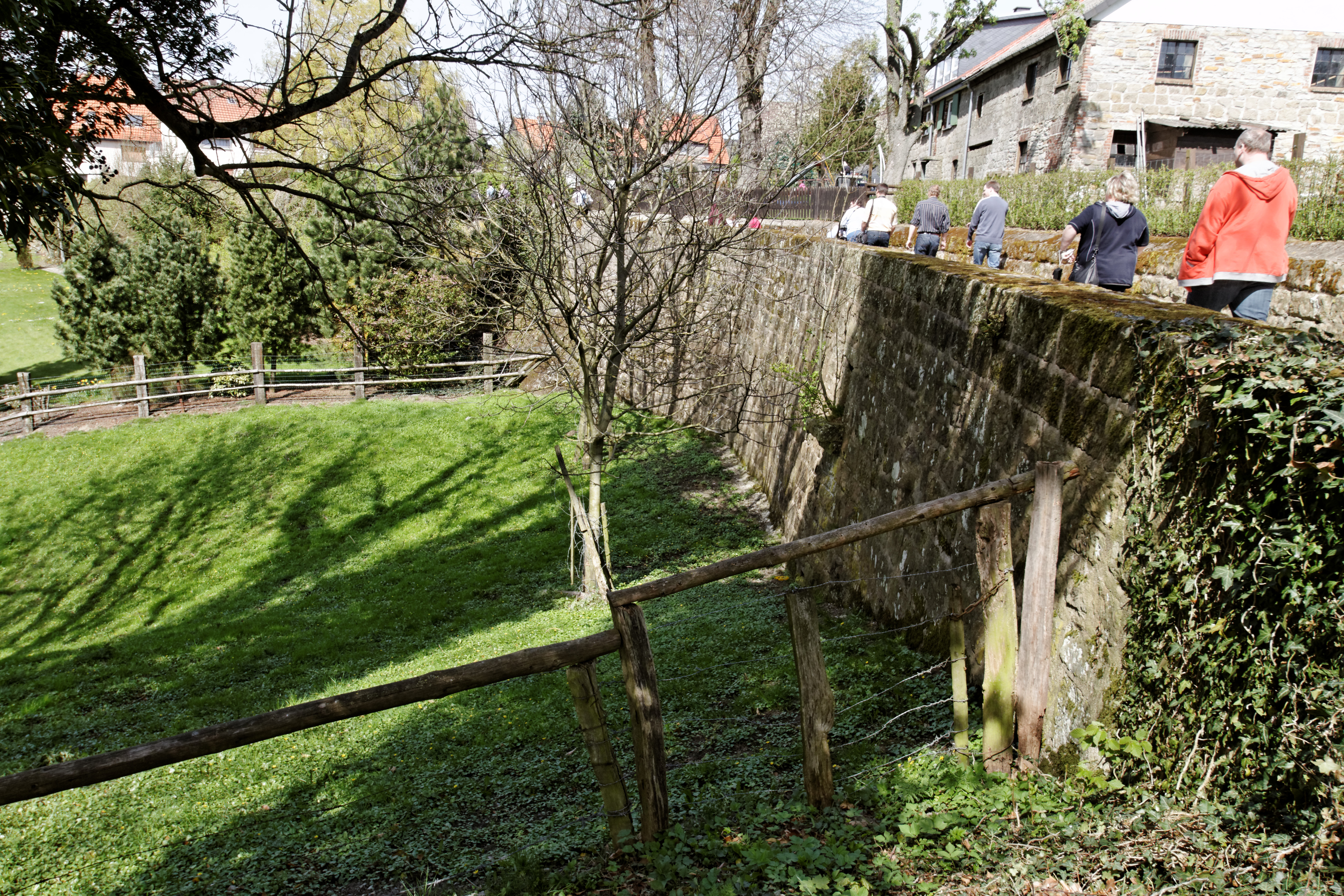 Rüthen, Stadtmauer